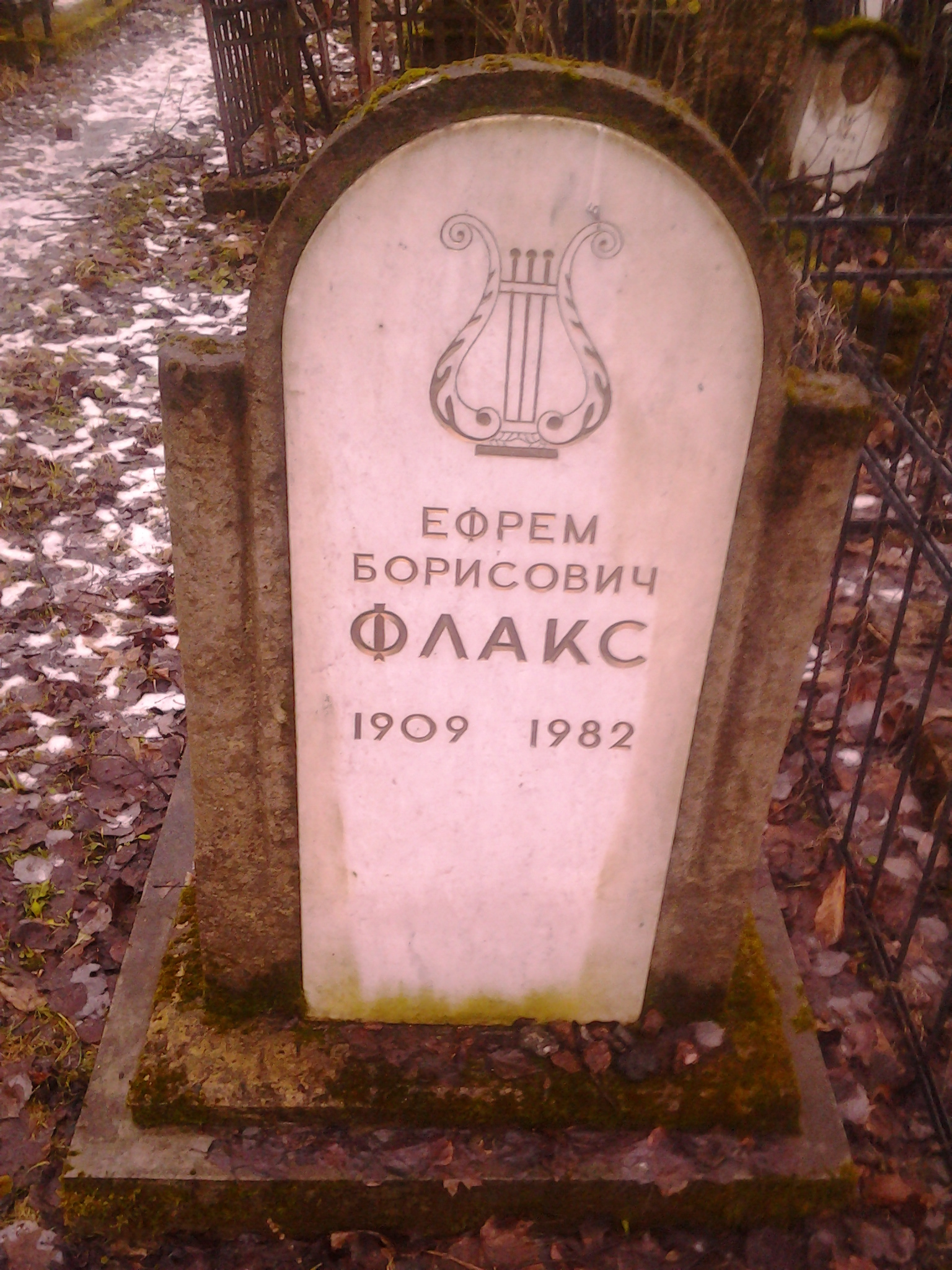 Надгробие на могиле Е. Б. Флакса на Еврейском (Преображенском) кладбище Санкт-Петербурга.